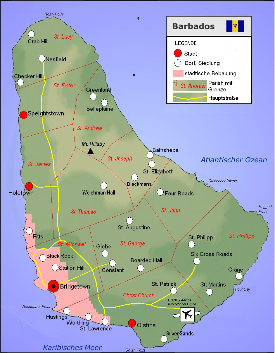 Karte der Insel Barbados mit schematischen Grenzen der Parishes, den Städten und ausgewählten zentralen Orten